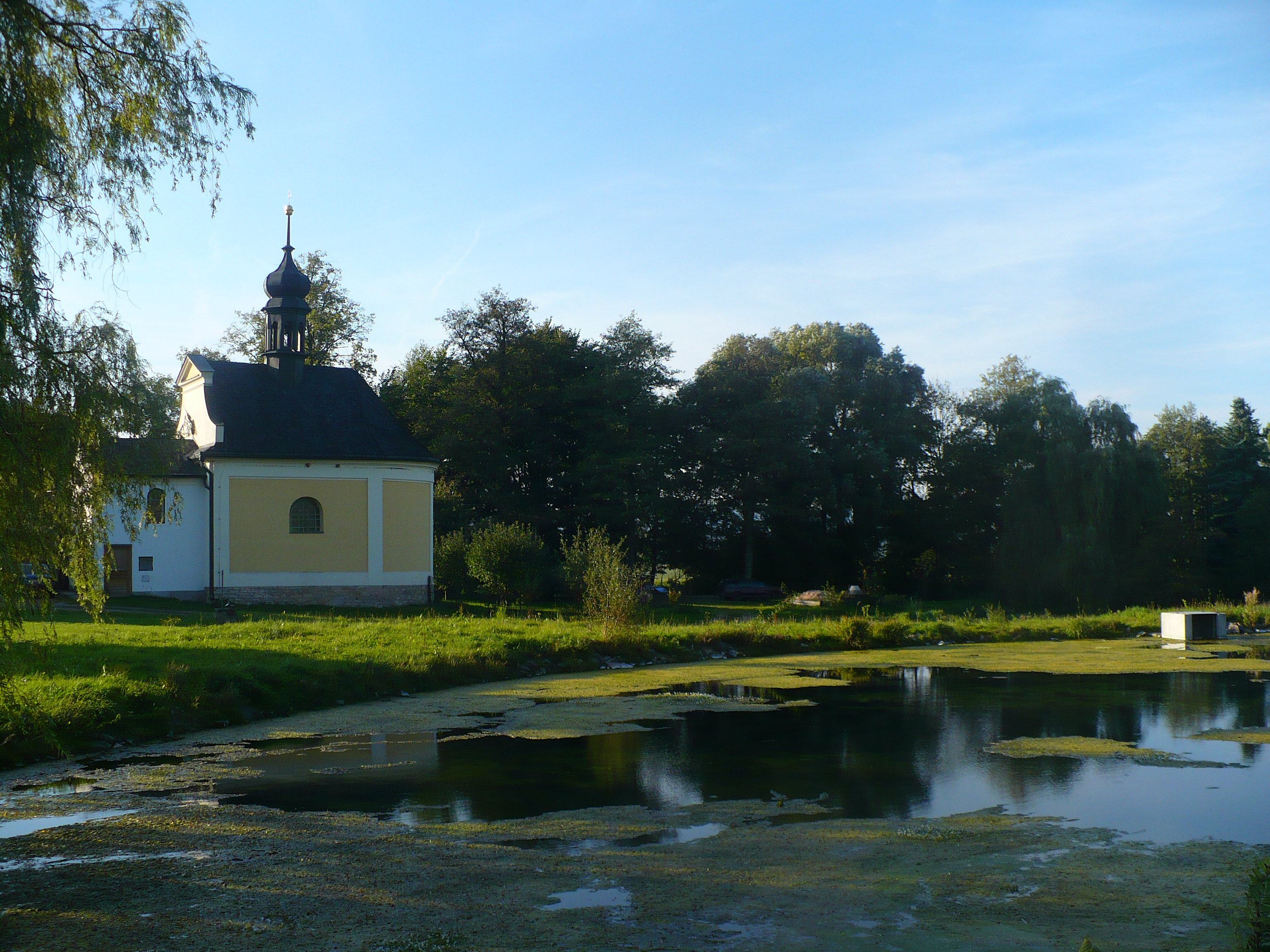 Celkový pohled na náves Trpíku